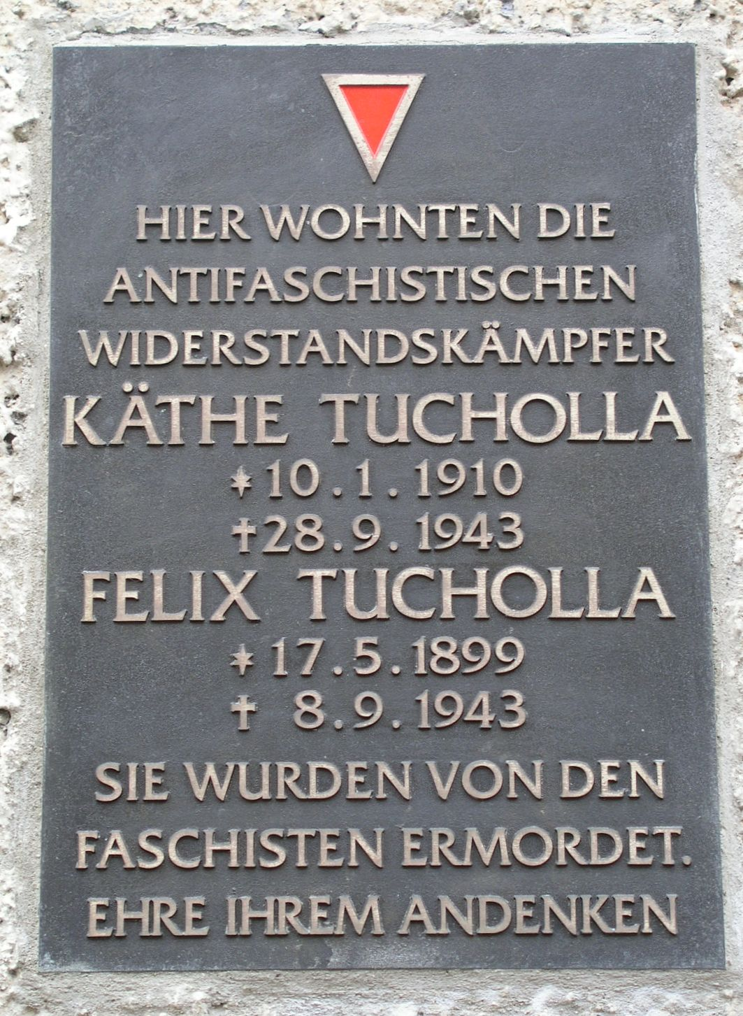 Gedenktafel für Käthe und Felix Tucholla am Haus Kaskelstr. 41